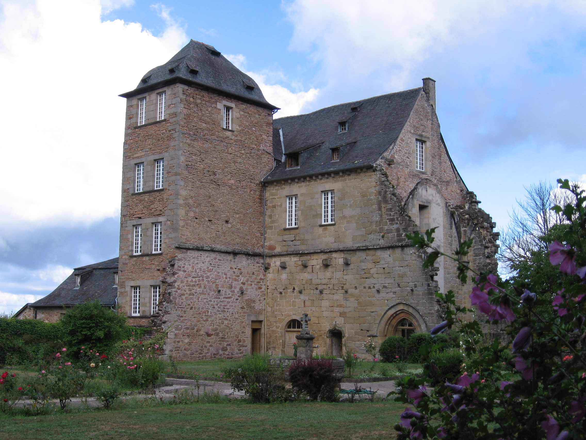 Logis abbacial